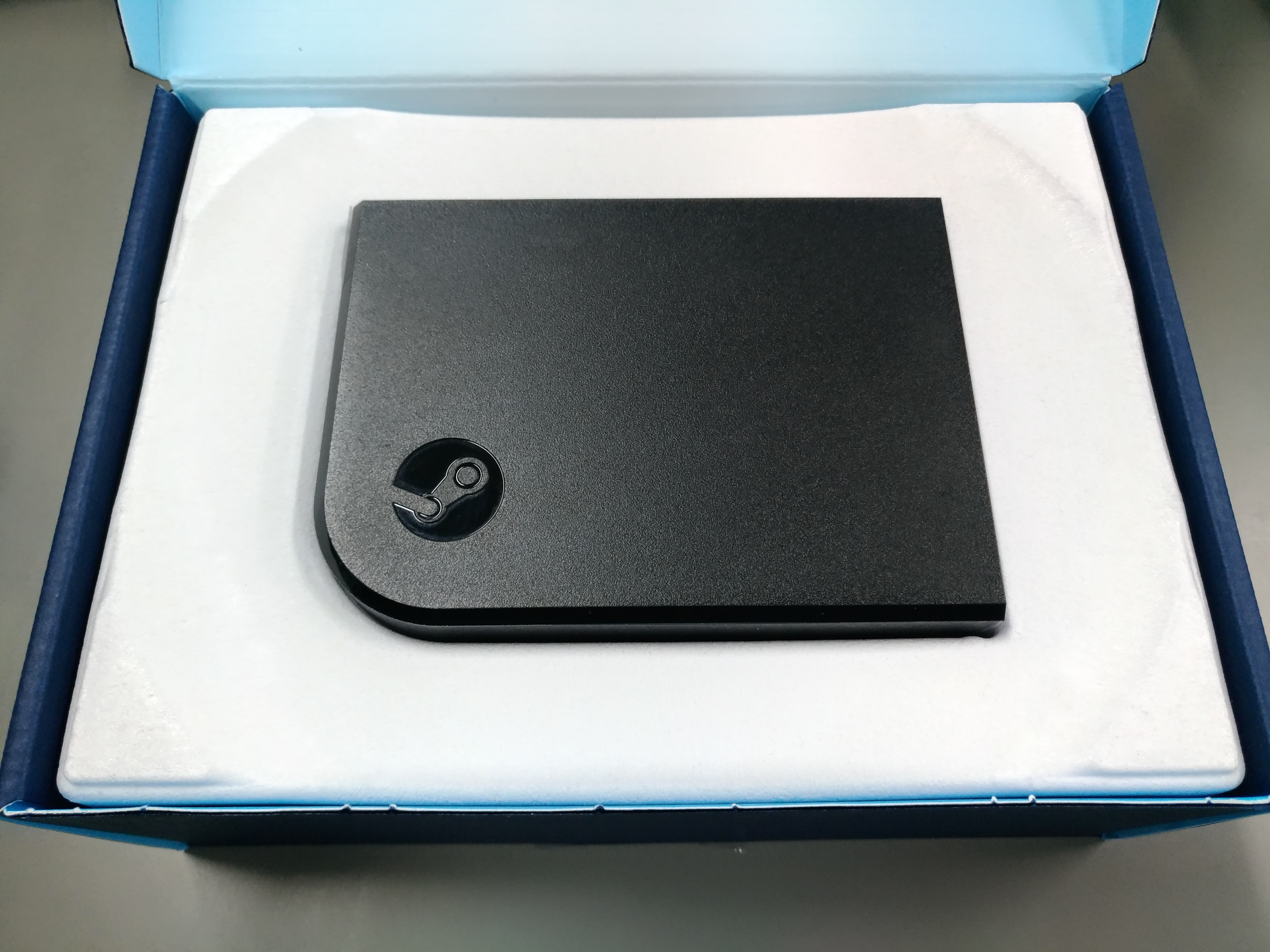 SteamLinkのパッケージを開けた状態の写真